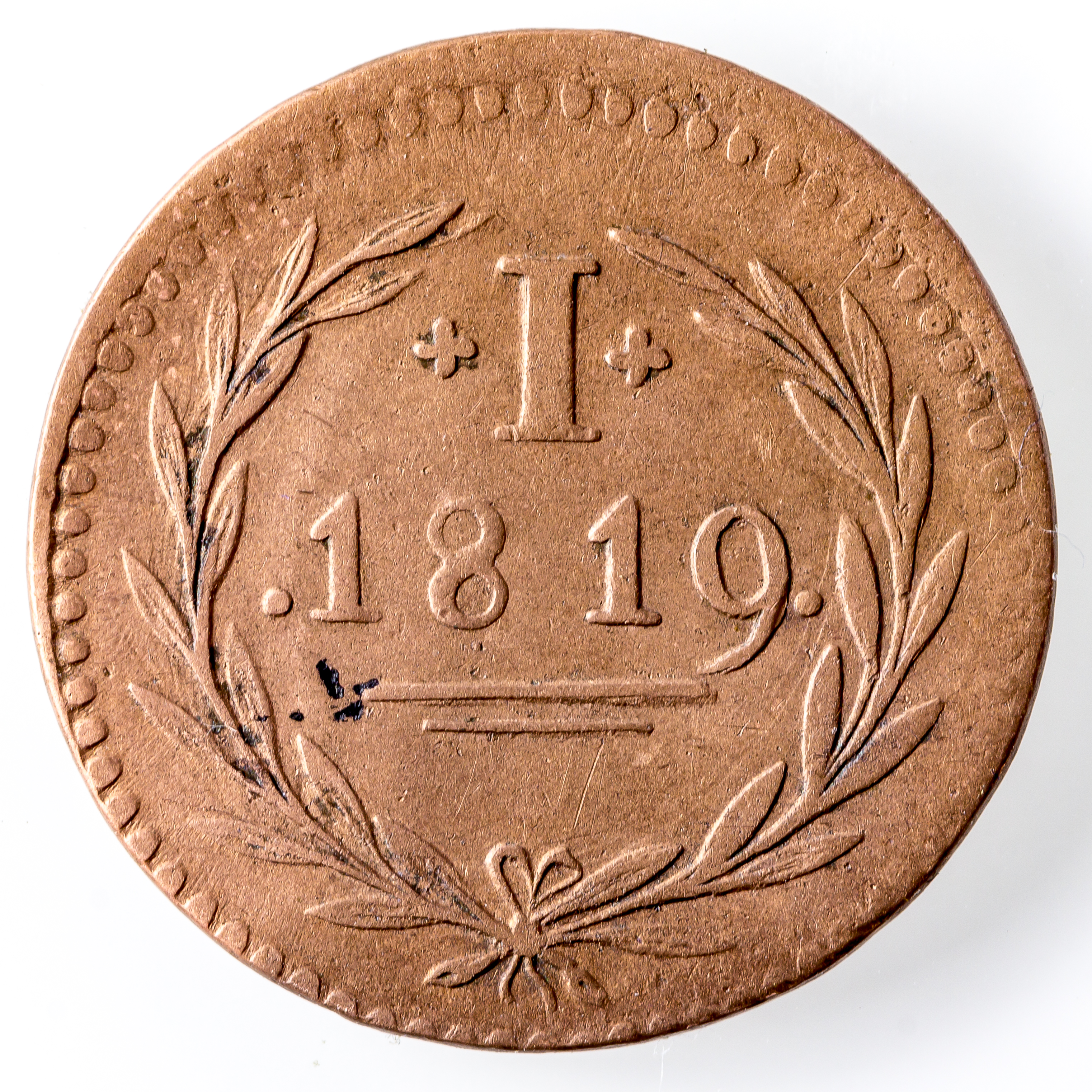 Judenpfennig 1819